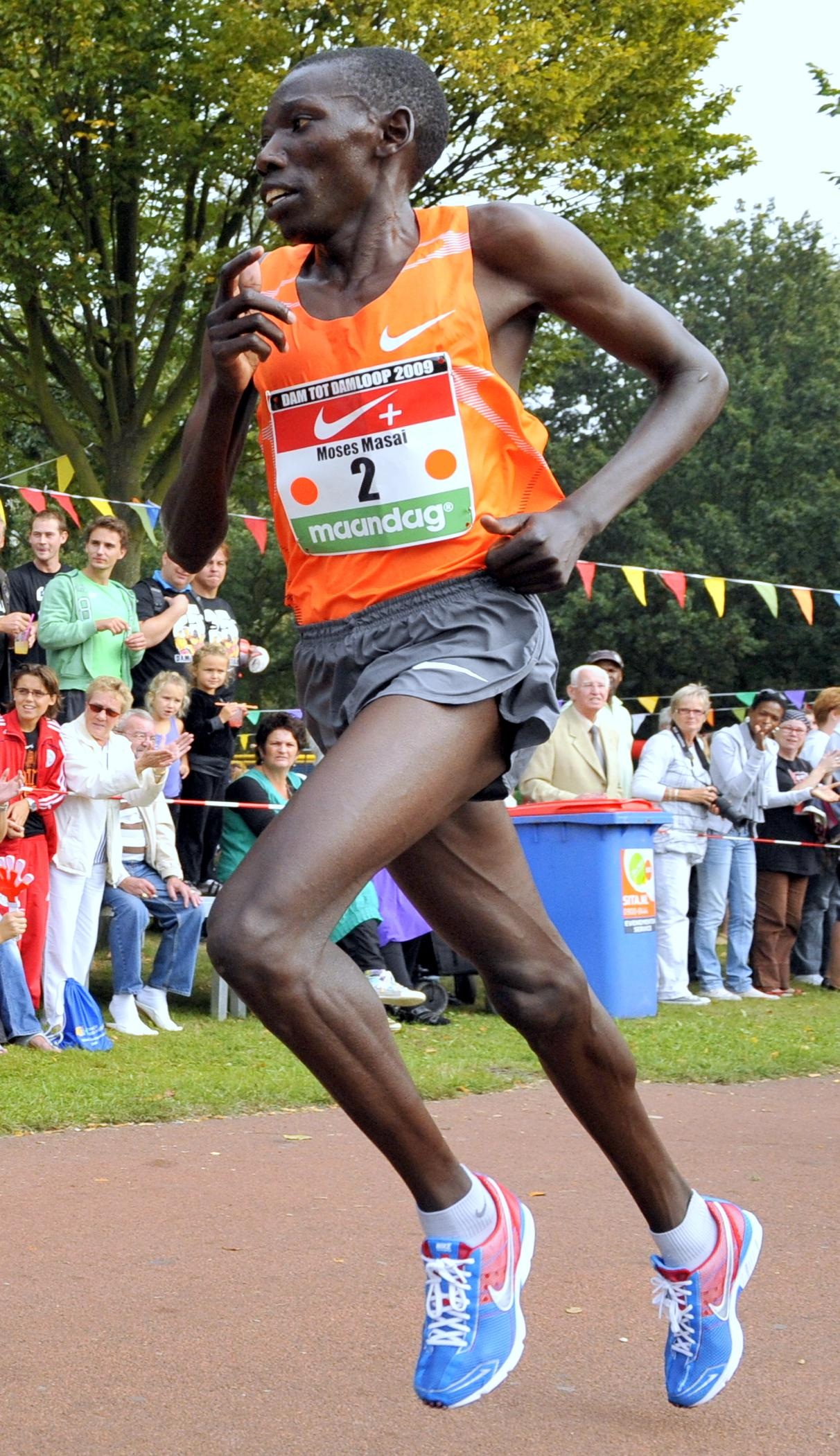 Moses Masai, wonnen de jubileumeditie van de Dam tot Damloop Zie ook